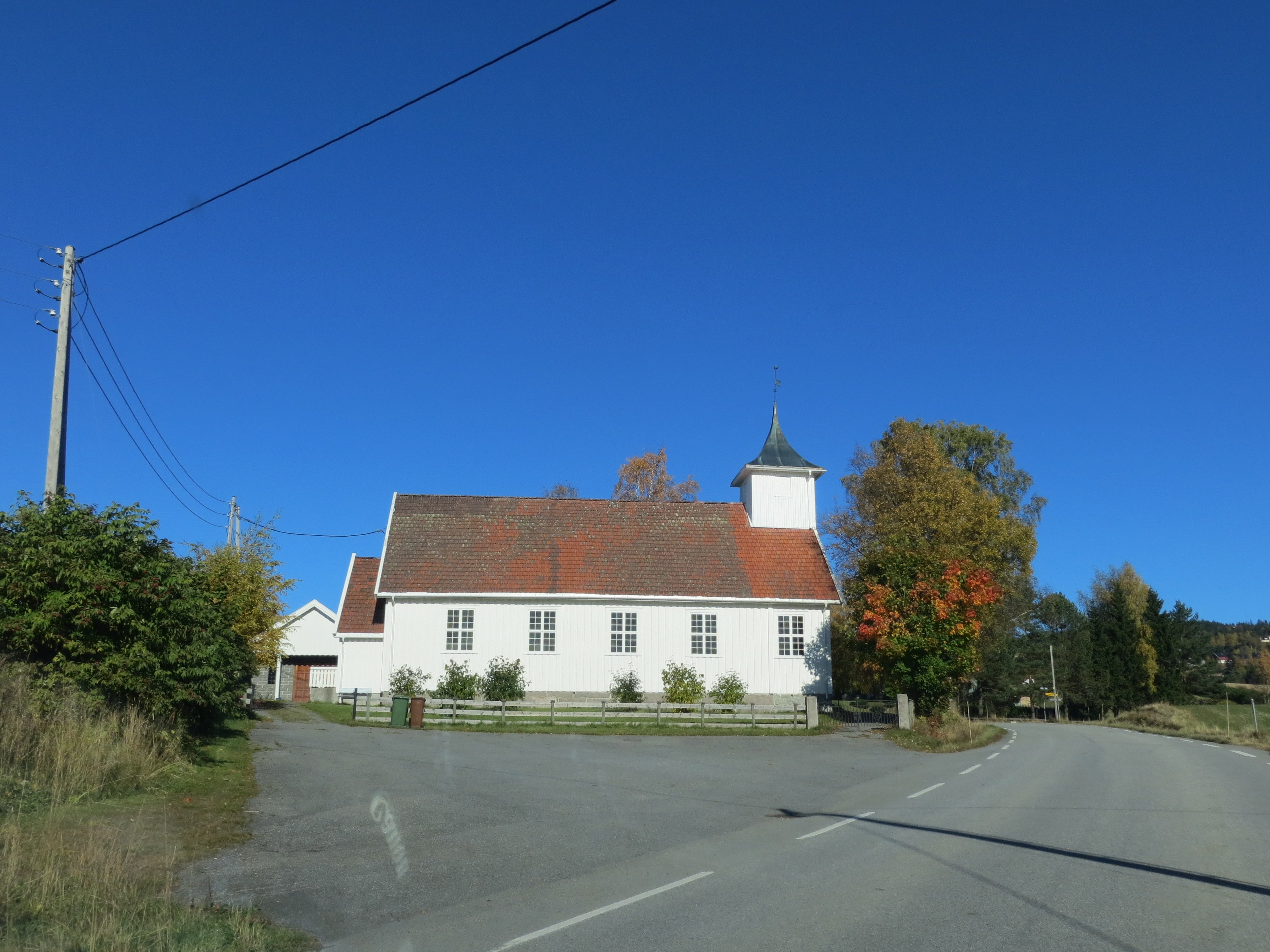 Church in the municipality of Lunner, at Hadeland (Oppland county, Norway).